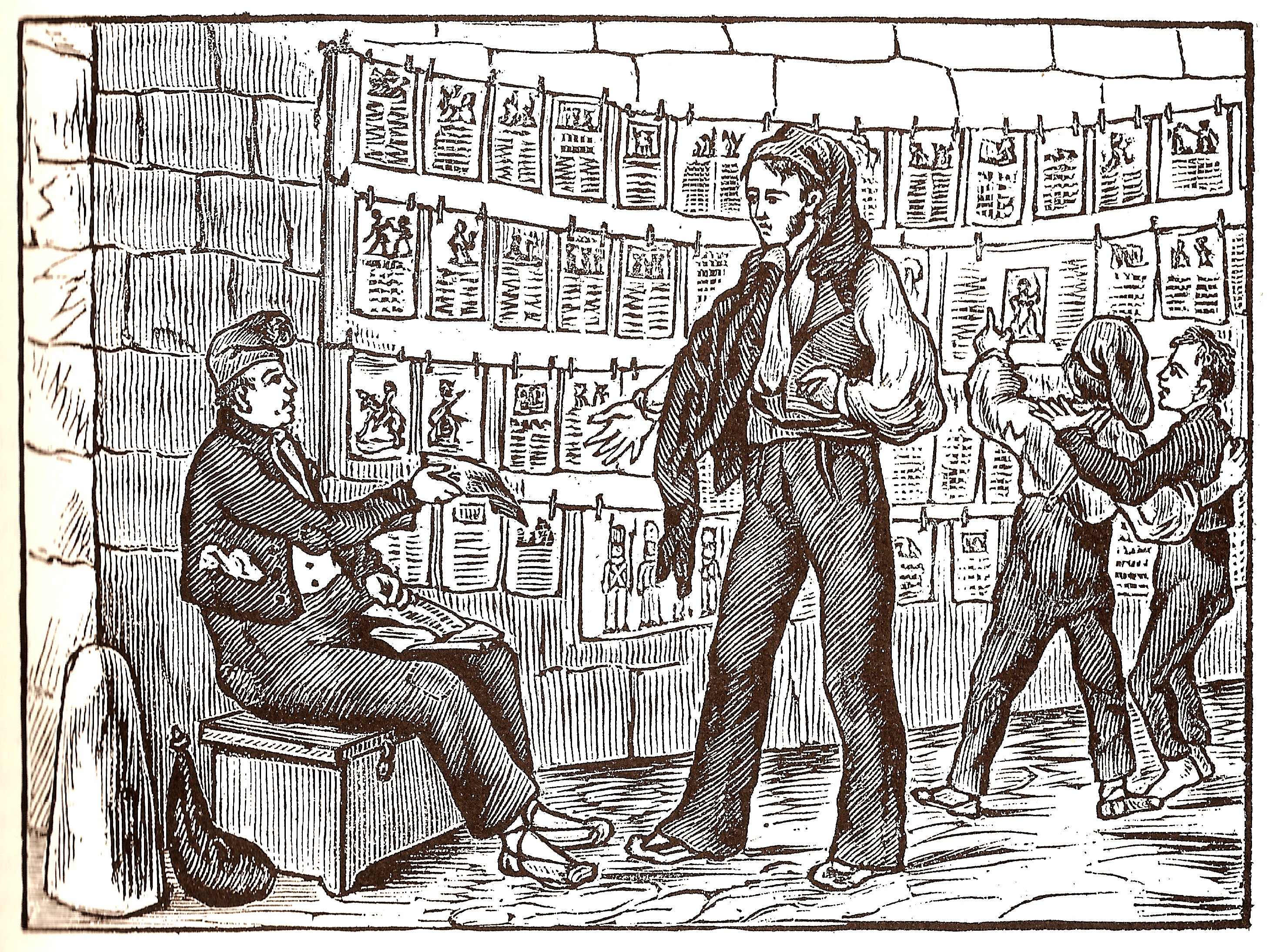 Literatura de canya i cordill. Els fulls impresos es mostraven agafats per pinces en cordills perquè el comprador pogués triar. Parada de romanços al costat del convent de Sant Agustí (Barri de la Ribera, Barcelona) segons el gravat que acompanya un sainet publicat el 1850.